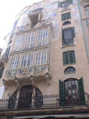 Edifici l'Àguila (Palma, Mallorca)